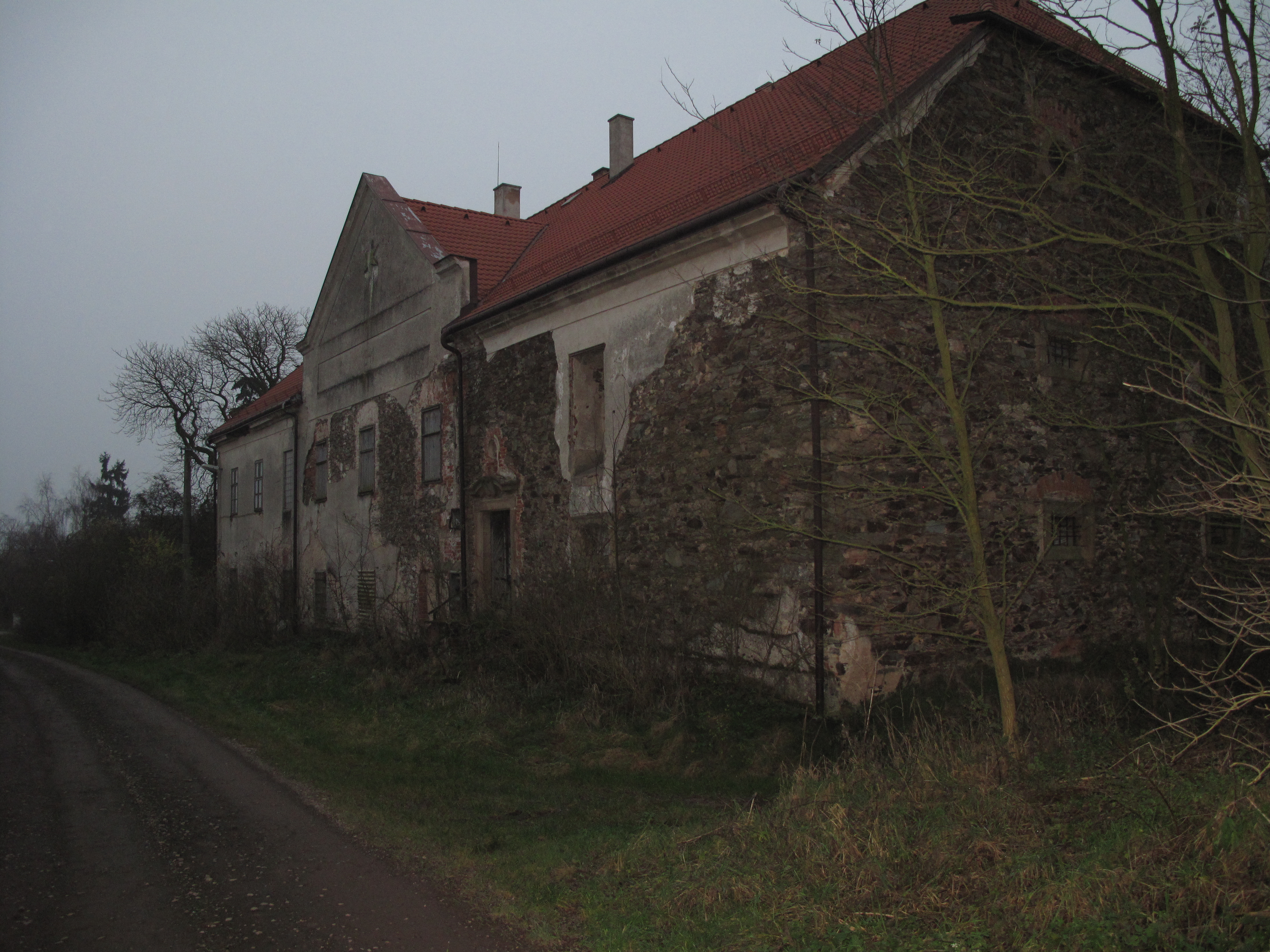 Dům v Zhoři. Okres Krakovec, Česká republika.